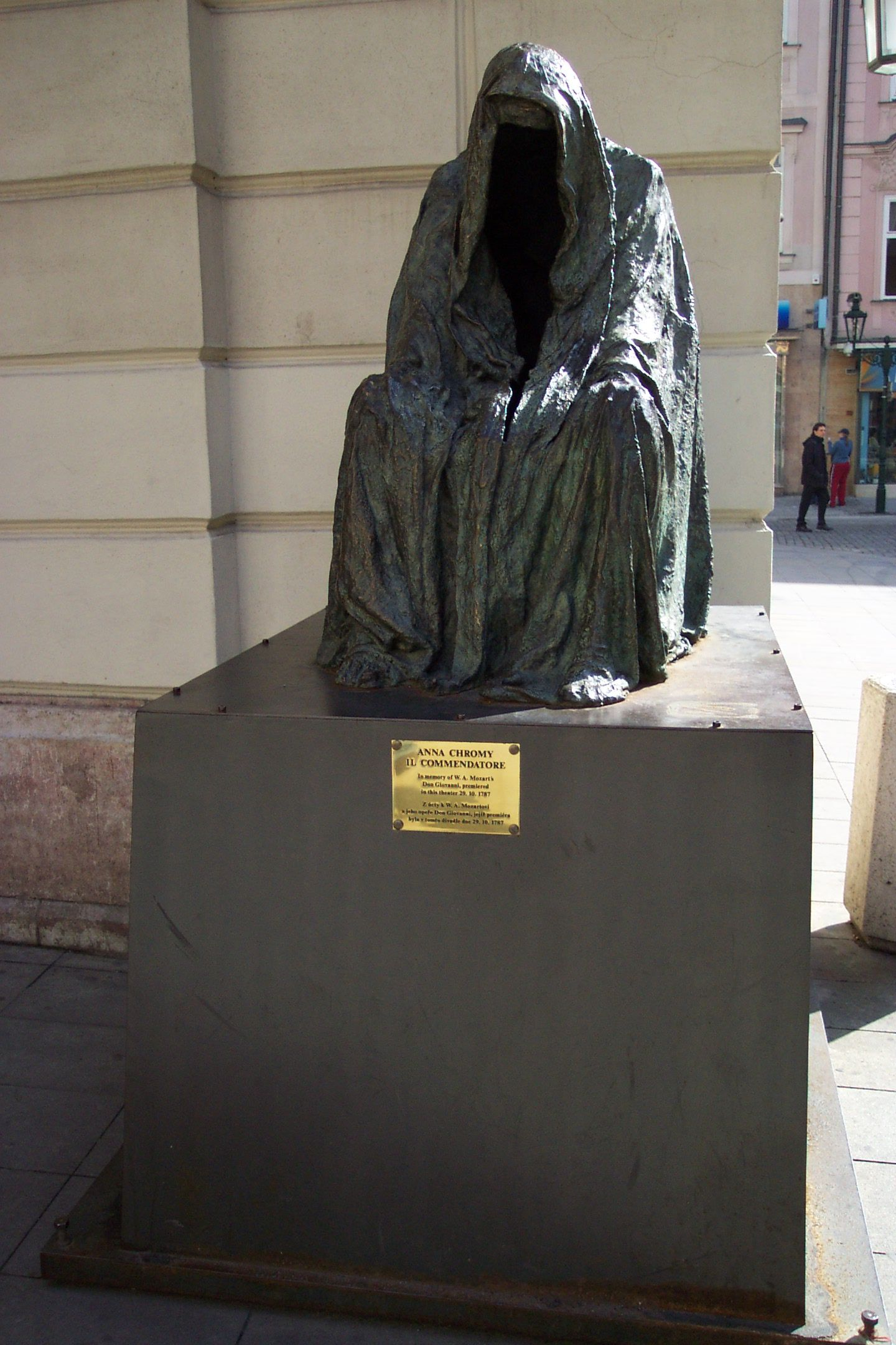 Prague, Staré město, statue close to Stavovské divadlo (theater) - Praha, Staré město, socha u Stavovského divadlo